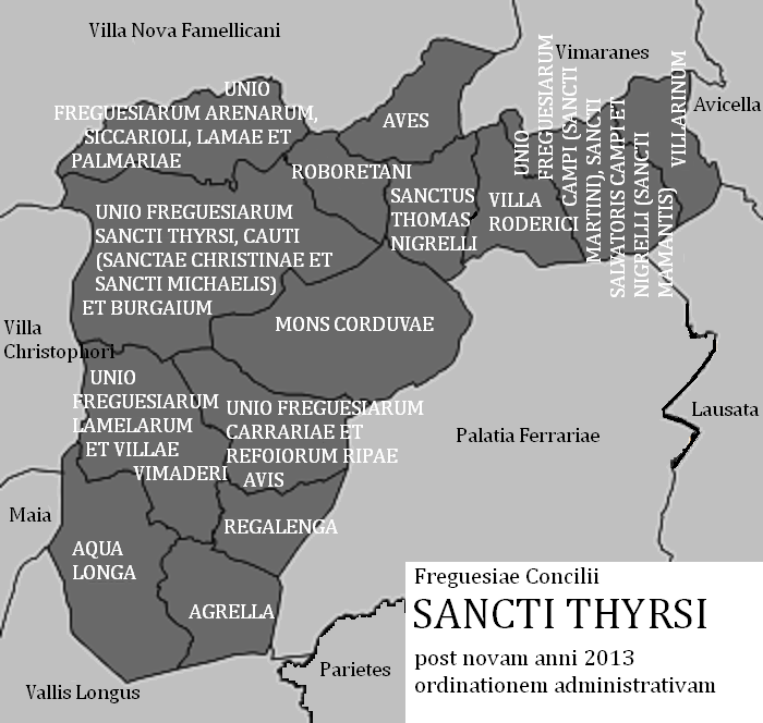 Concilii Sancti Thyrsi freguesiae post novam anni 2013 ordinationem administrativam.